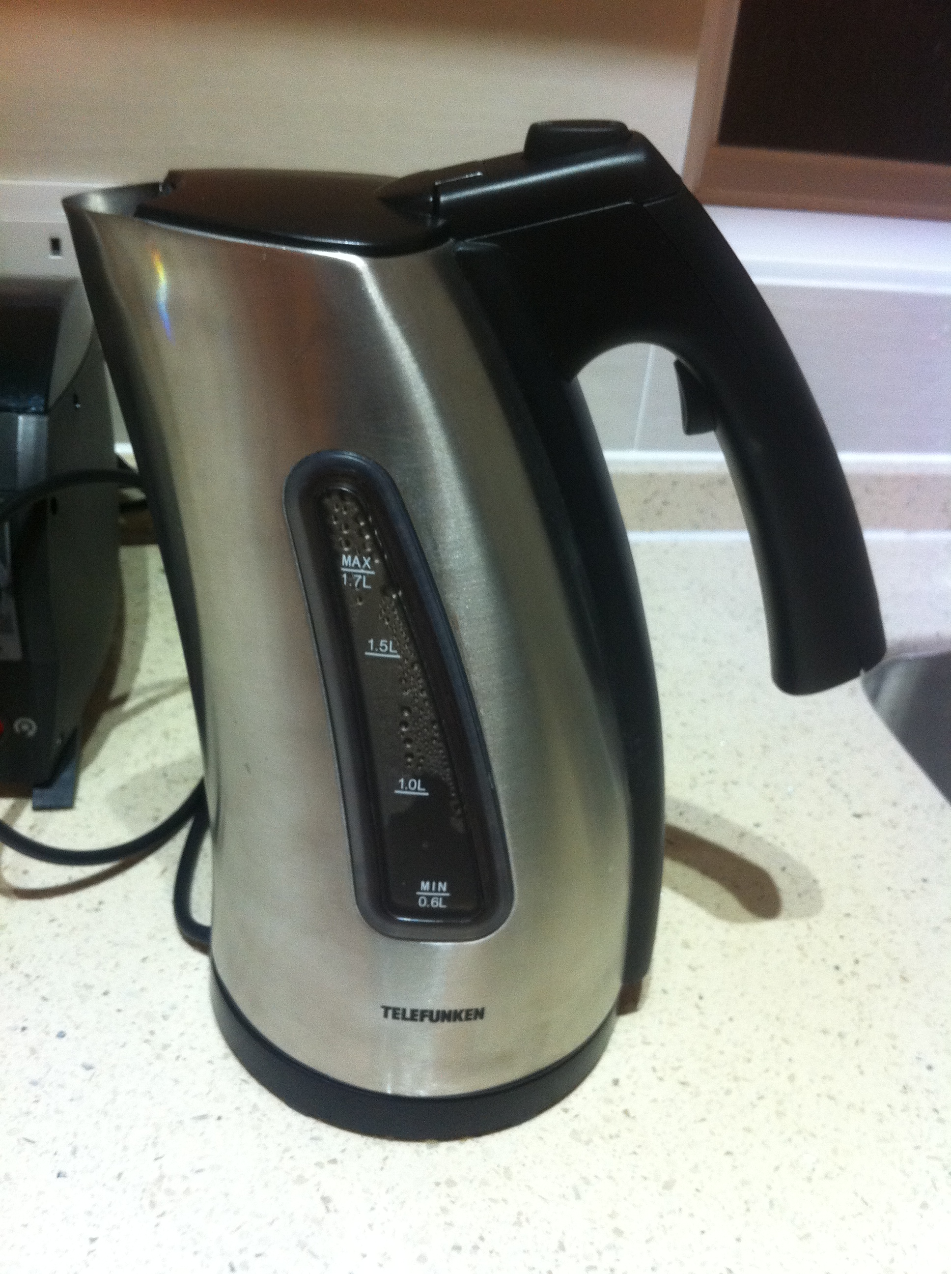 中文（香港）: 水煲電器